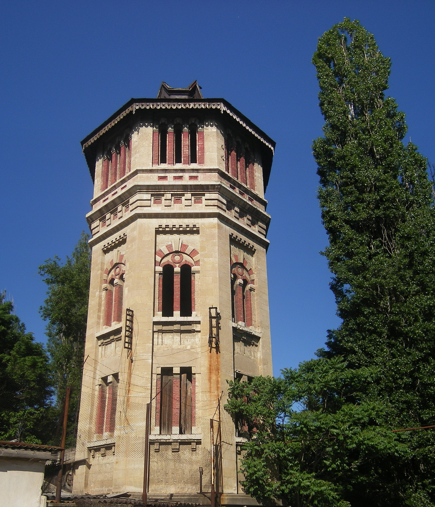 Водонапорная башня: улица А. Невского, 27, литер "1Р", Симферополь, Крым This object is located on the Crimean Peninsula and recognized as cultural heritage by Russia under the monument ID: 8231047000. The legal status of the Crimean region is currently disputed.